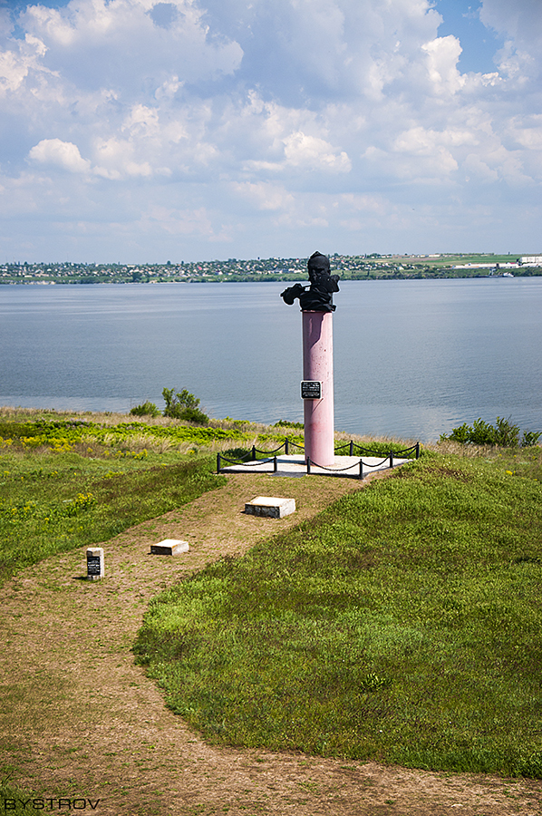 Каменская Сечь